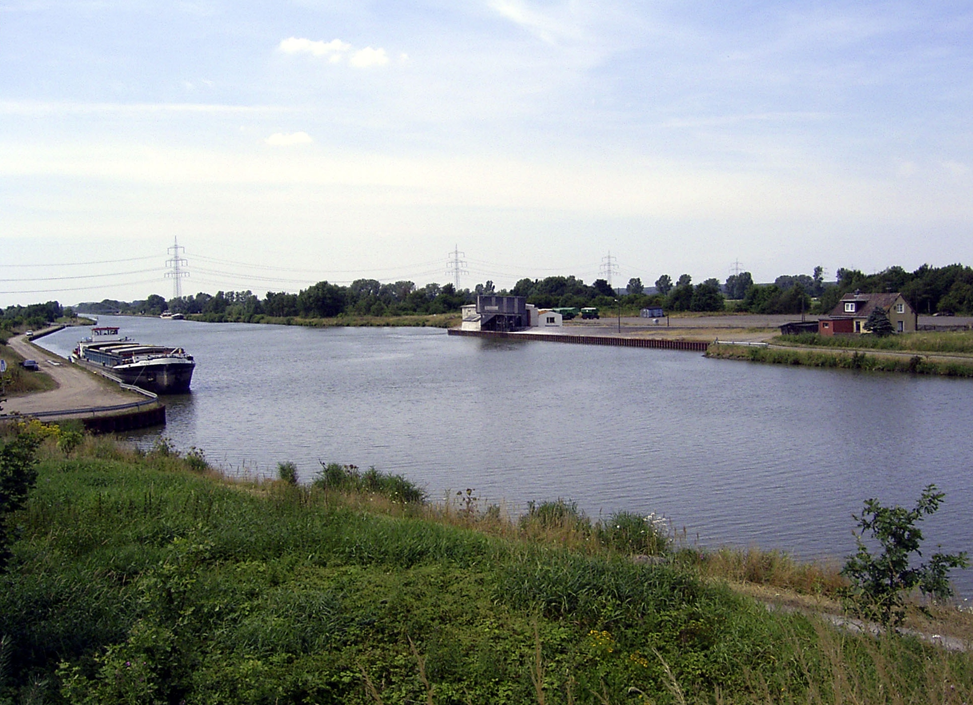 Der Hafen der Stadt Sachsenhagen am Mittellandkanal